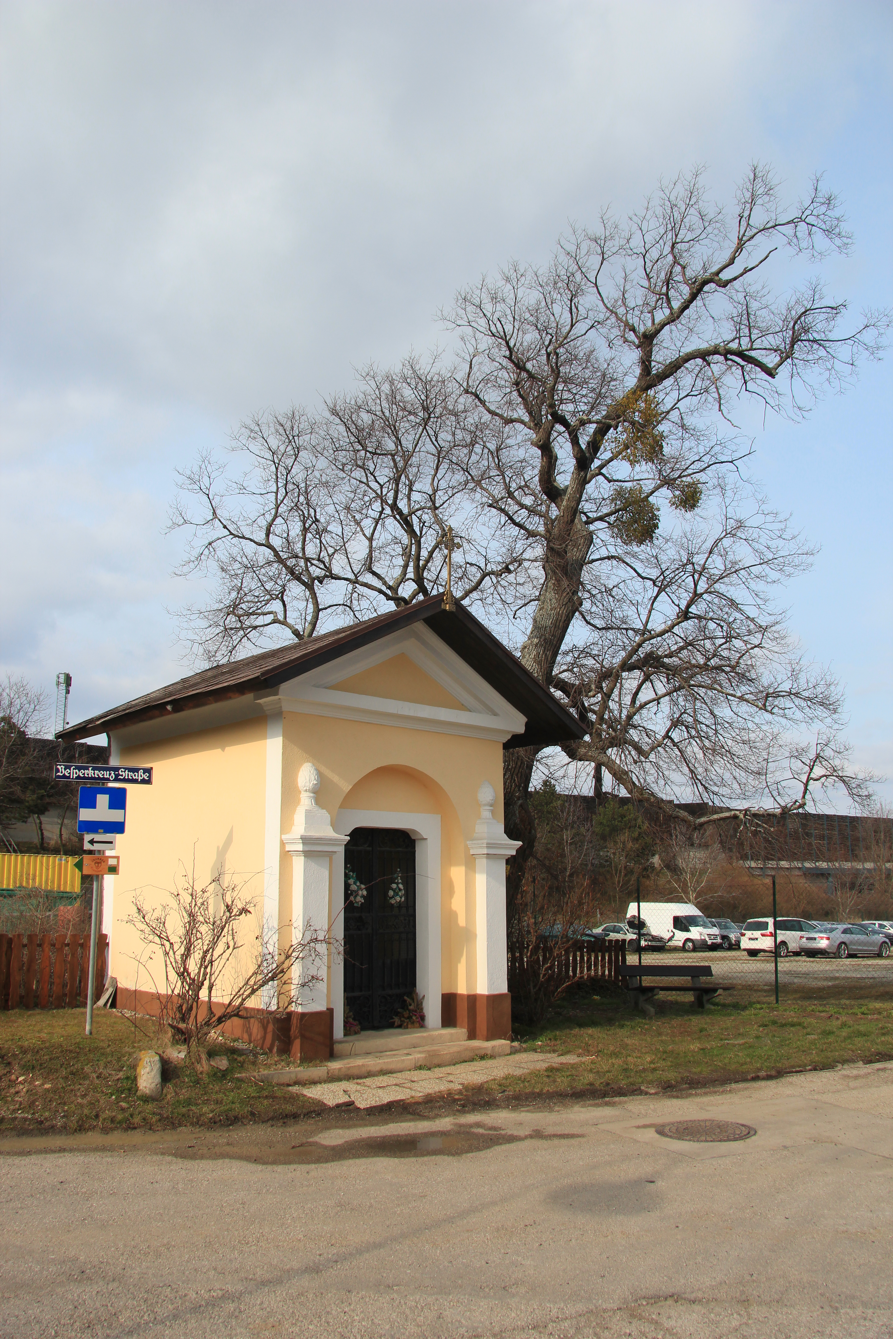 Vesperkreuz (Brauhauskapelle) mit Winterlinde an der Grenze von Brunn und Perchtoldsdorf This media shows the natural monument in Lower Austria with the ID MD-083.